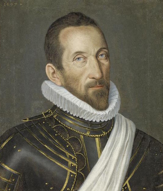 François de Bonne de Lesdiguières, huile sur toile, 1597, Dijon, musée Magnin.